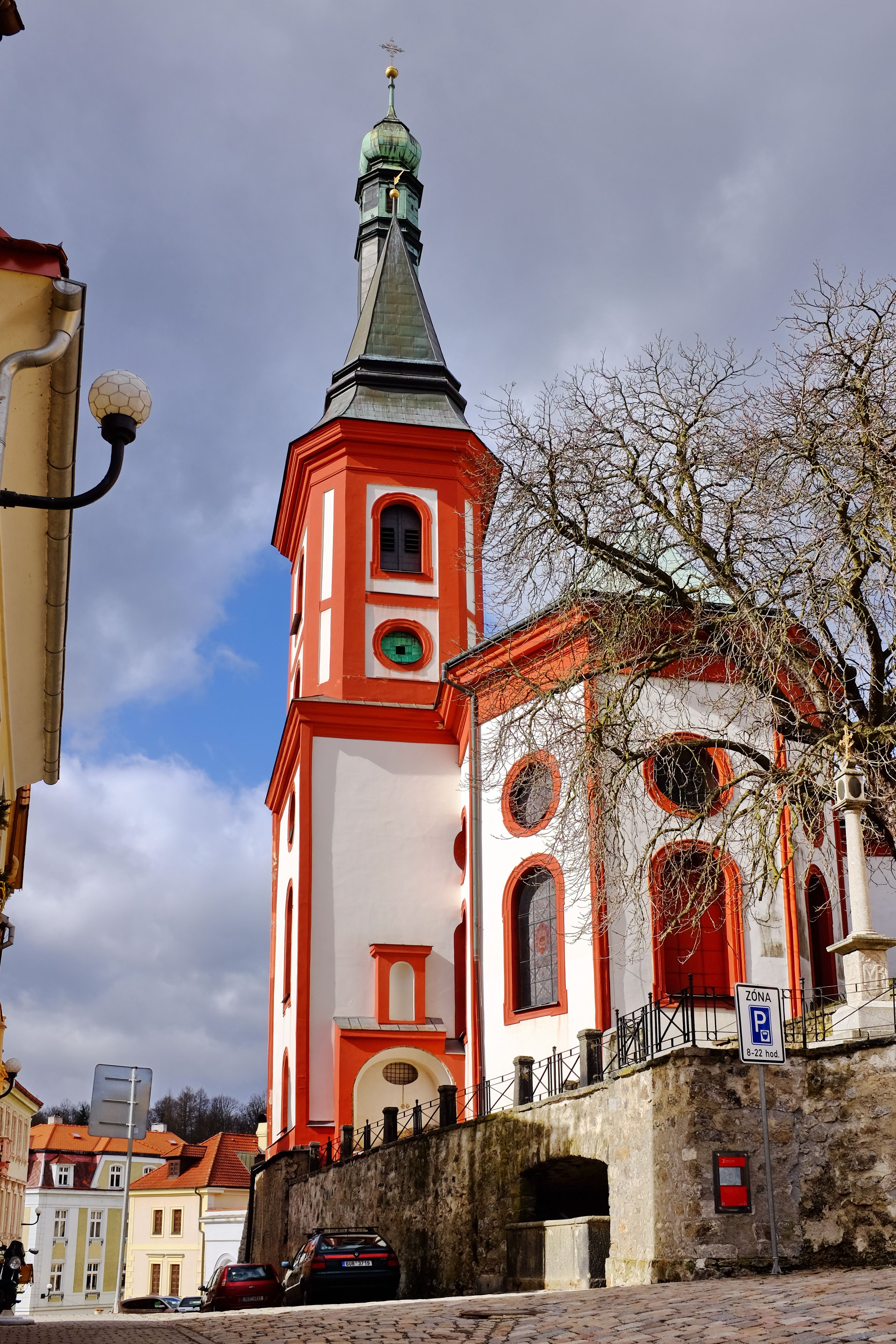 Kostel svatého Václava, Kostelní 14/3, Loket (okres Sokolov).